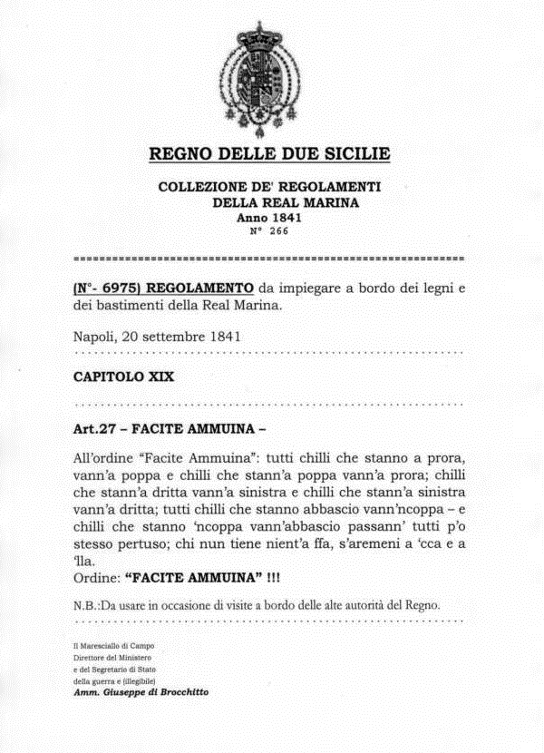 Facite Ammuina (che in napoletano significa fate confusione) sarebbe stato un comando contenuto nel Regolamento da impiegare a bordo dei legni e dei bastimenti della Real Marina del Regno delle Due Sicilie del 1841. Si tratta molto probabilmente di un falso storico fatto forse circolare dai piemontesi per screditare le forze armate del Regno delle Due Sicilie, la cui marina era un modello di efficienza.